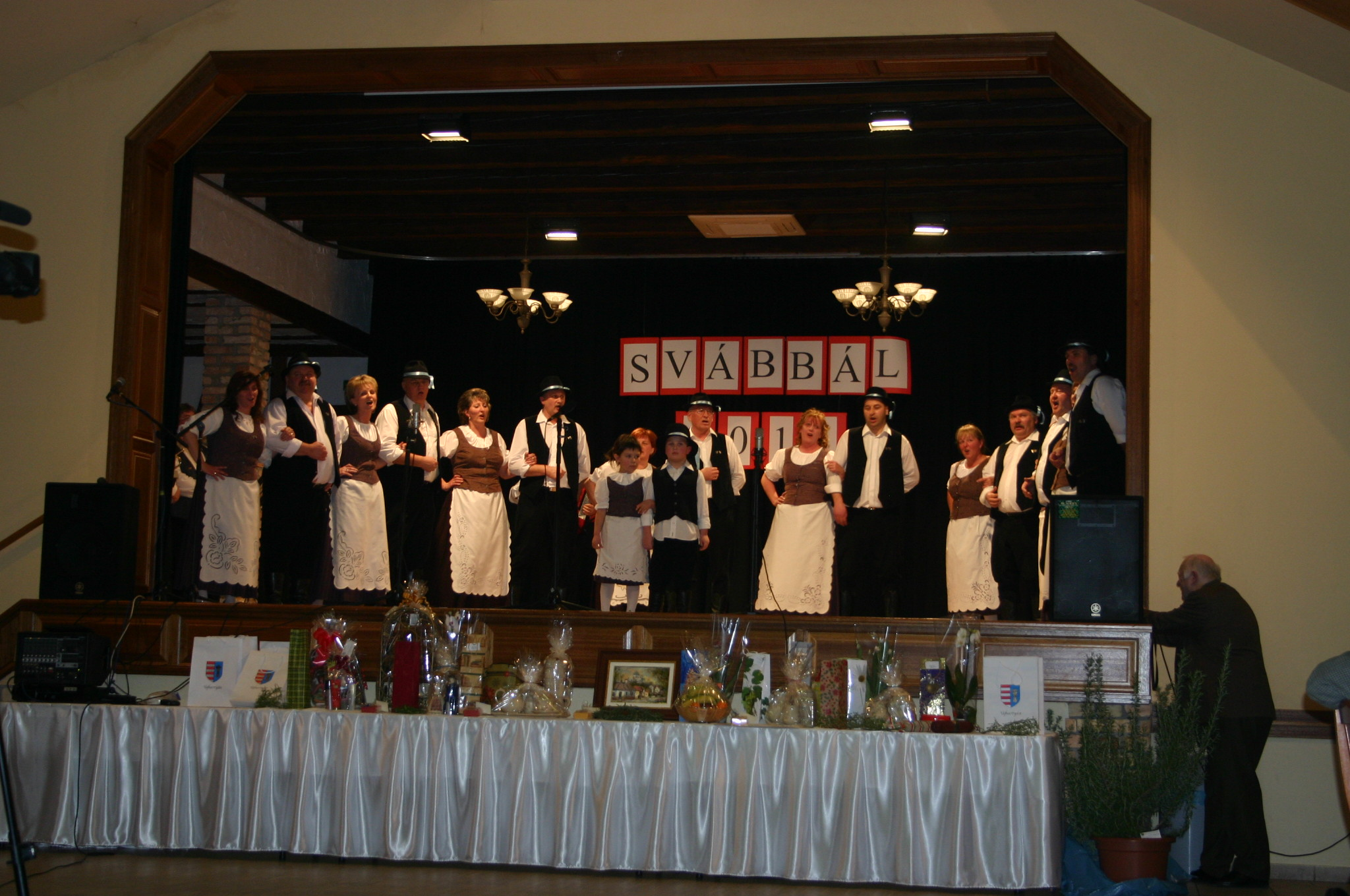 Tanzgruppe